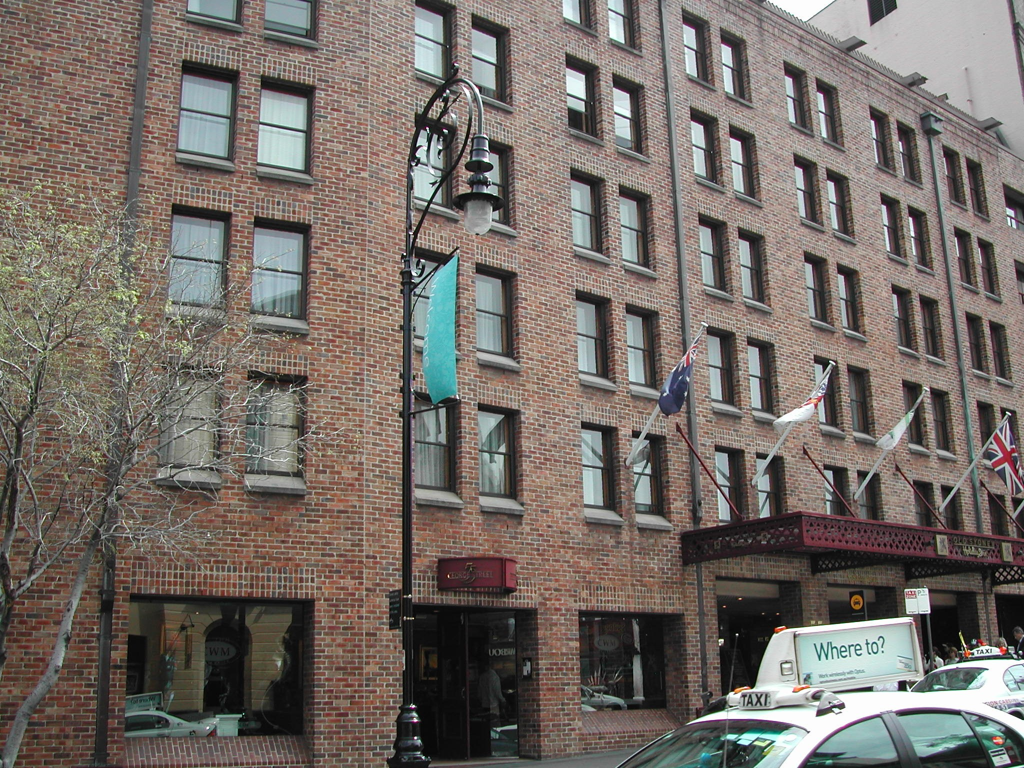 Gebai aus The Rocks. Rocks Rocks